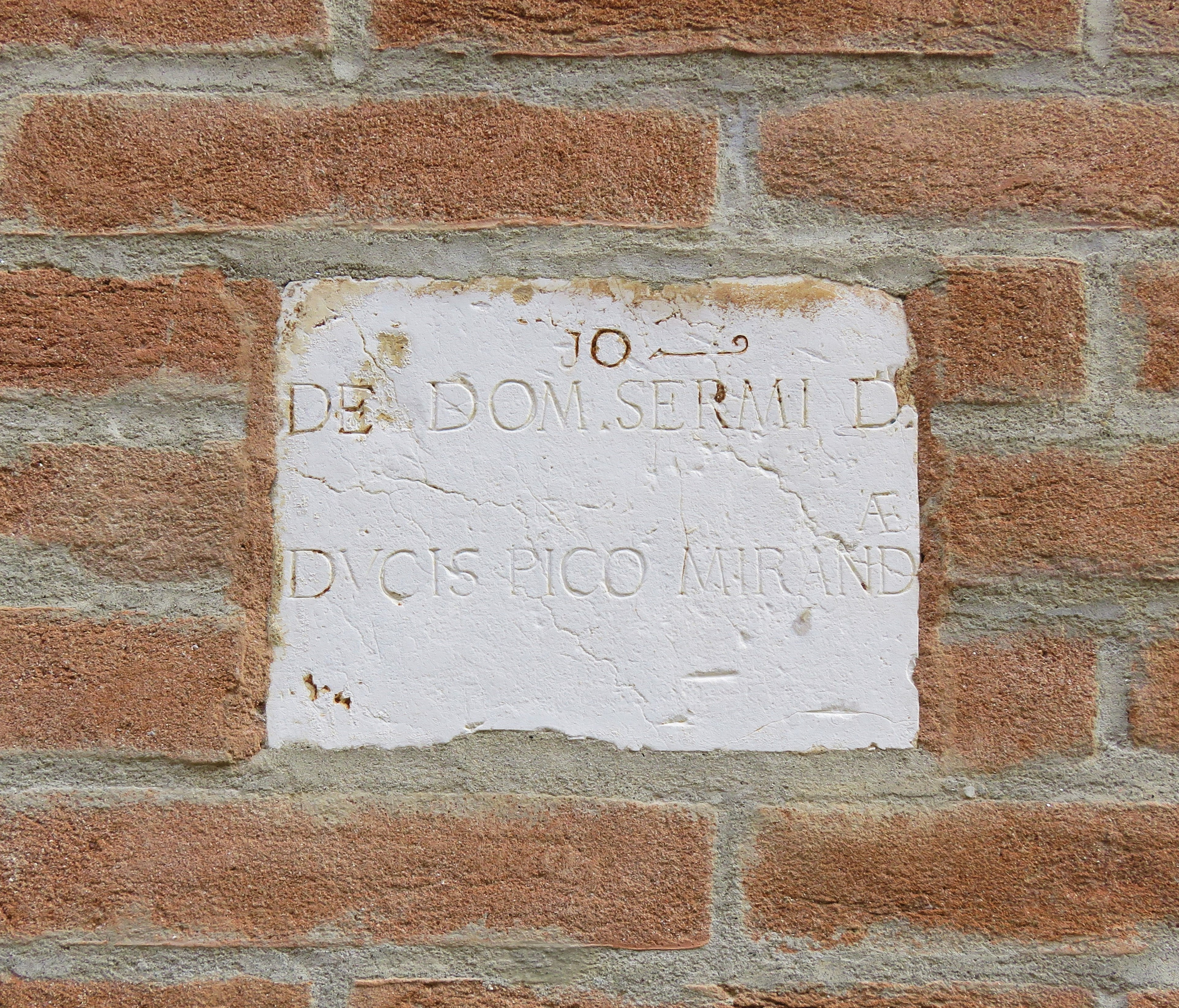 Piccola epigrafe accanto all'ingresso del moderno edificio in via del Turco di Ferrara, al civico 29. Un tempo in questo luogo esisteva una delle residenze ferraresi di Giovanni Pico della Mirandola.